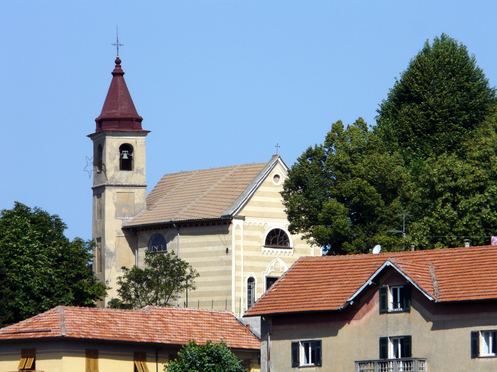 Il santuario di Nostra Signora della Guardia, Crocefieschi, Liguria, Italia